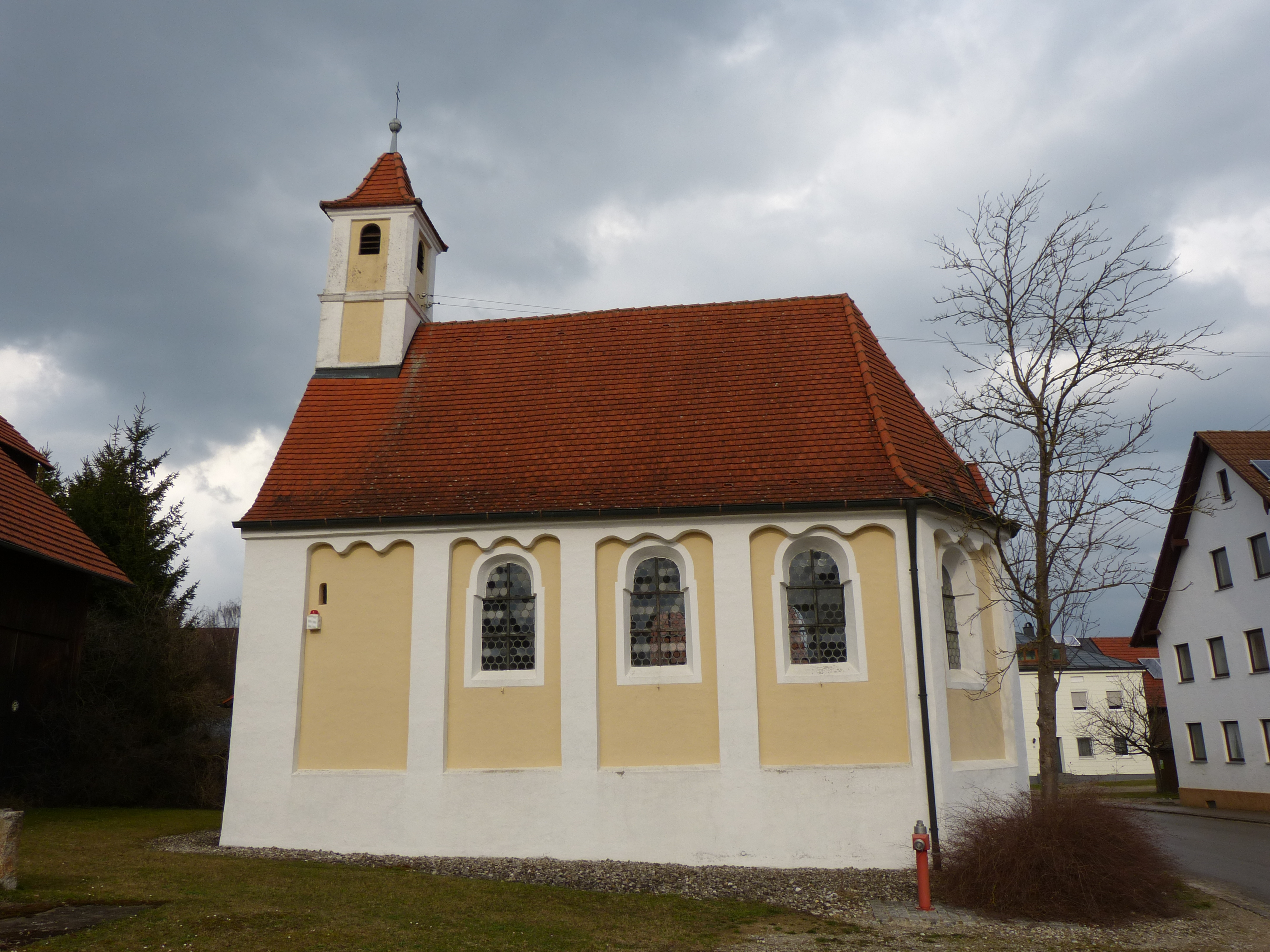 St. Sebastian in Rummeltshausen, Gemeinde Westerhaim, Landkreis Unterallgäu, Bayern